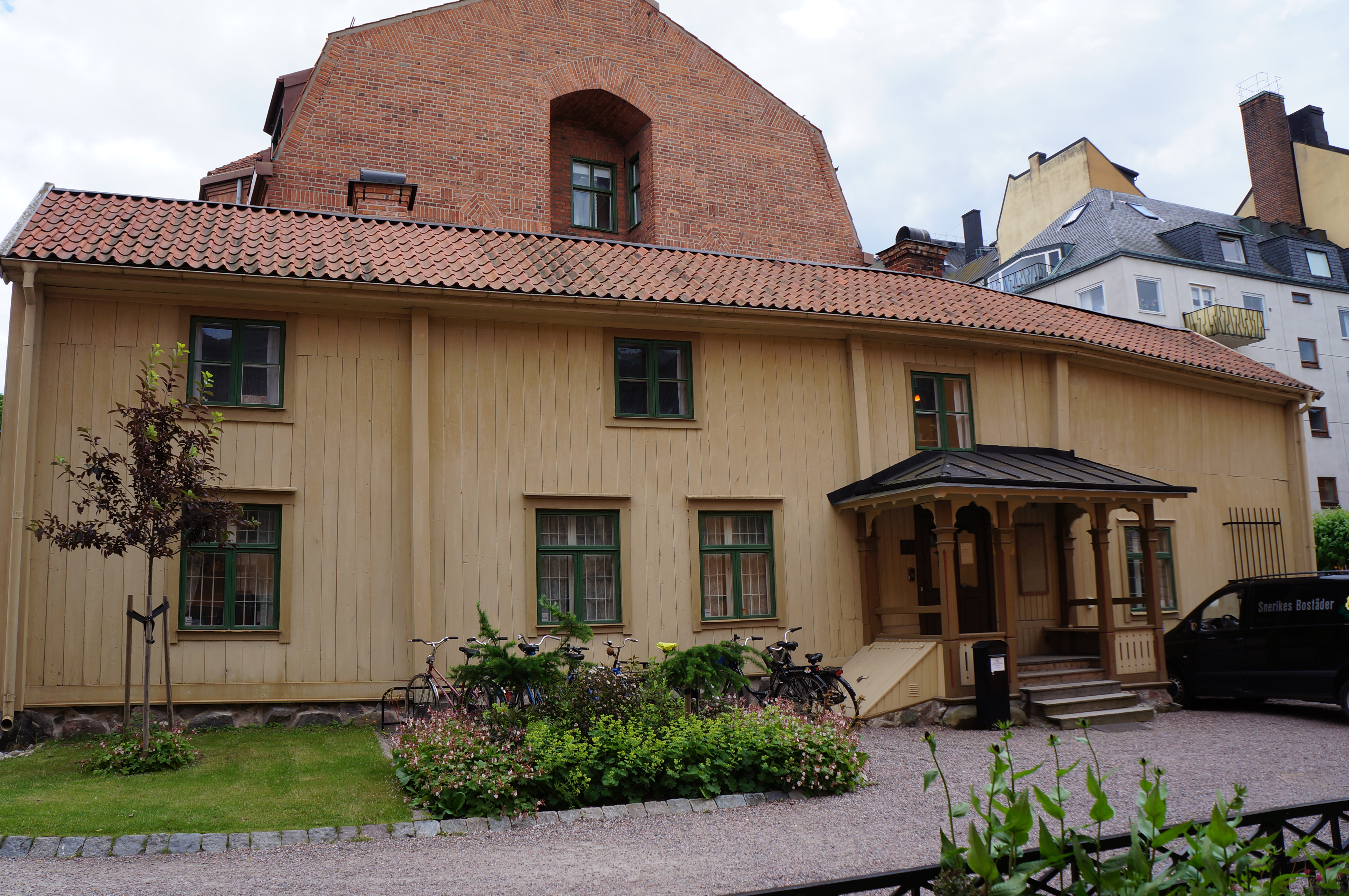 Backmanska huset, Södermnanlands-Nerikes nation